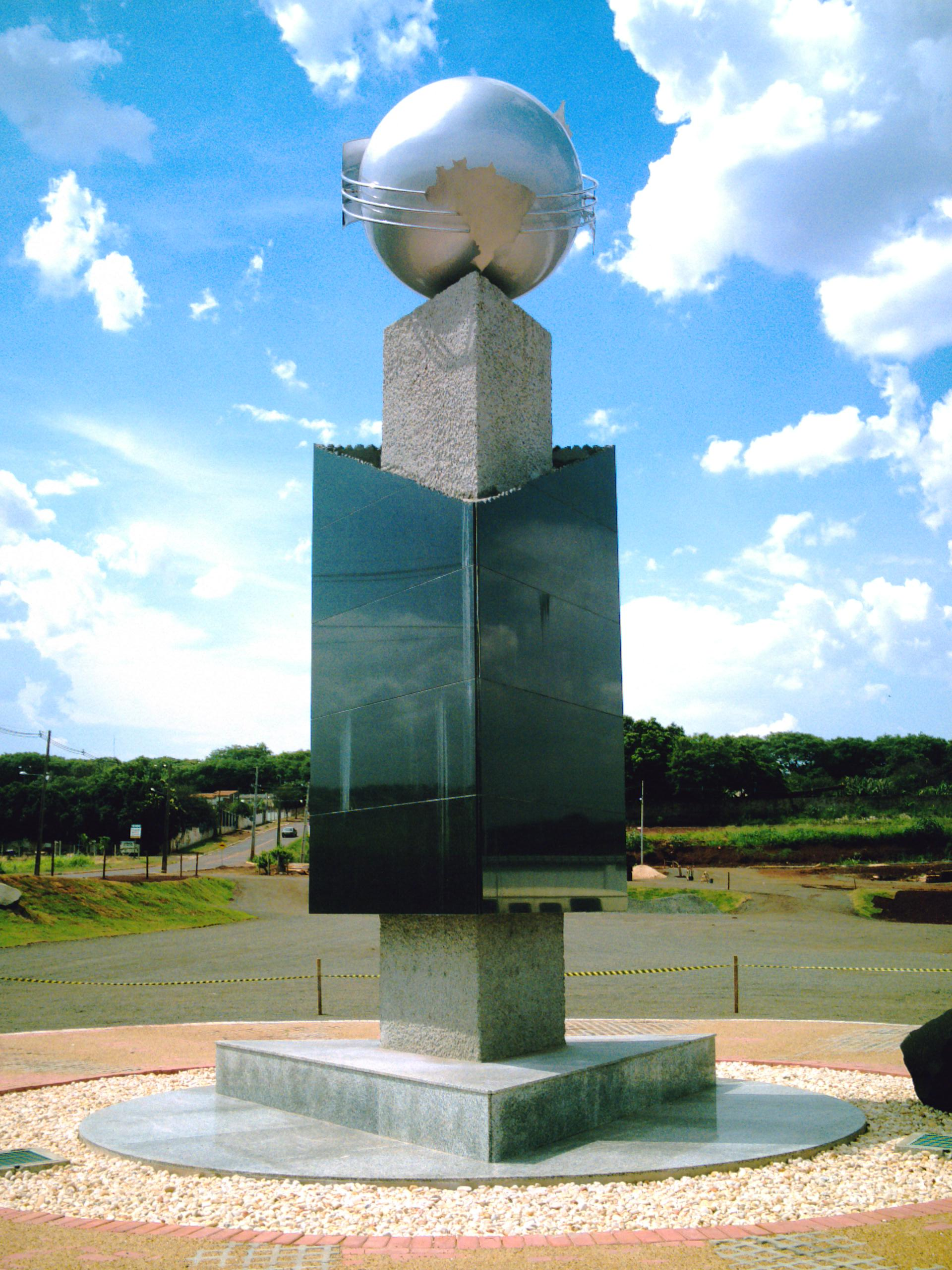 Monumento em homenagem aos 100 anos da imigração japonesa-By Maykola